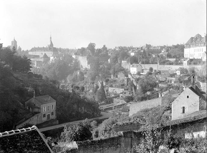 Panorama de la ville d'Avallon avec le couvent des Ursulines, les anciens remparts, la sous-préfecture et la tour de l'Horloge vers 1925.